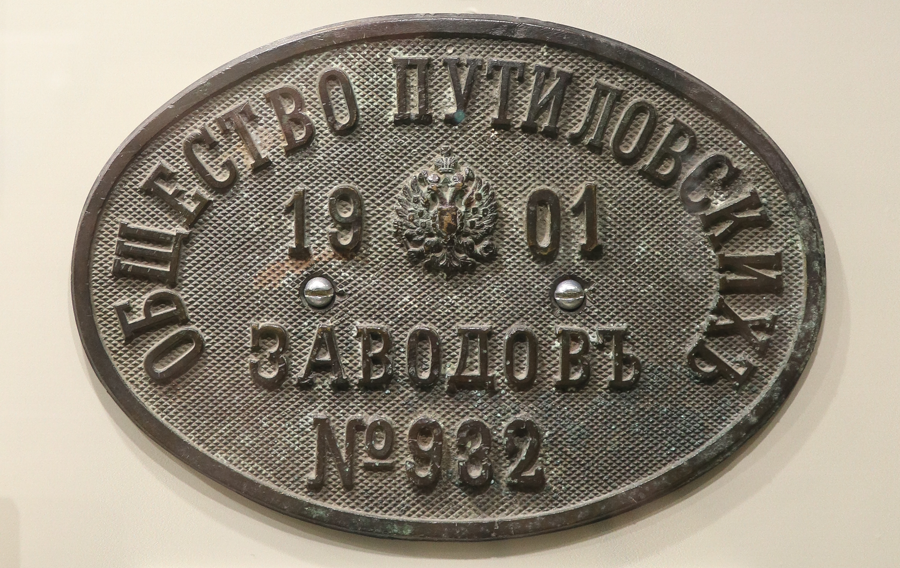 Шильдик Общества Путиловских заводов в экспозиции Орского краеведческого музея